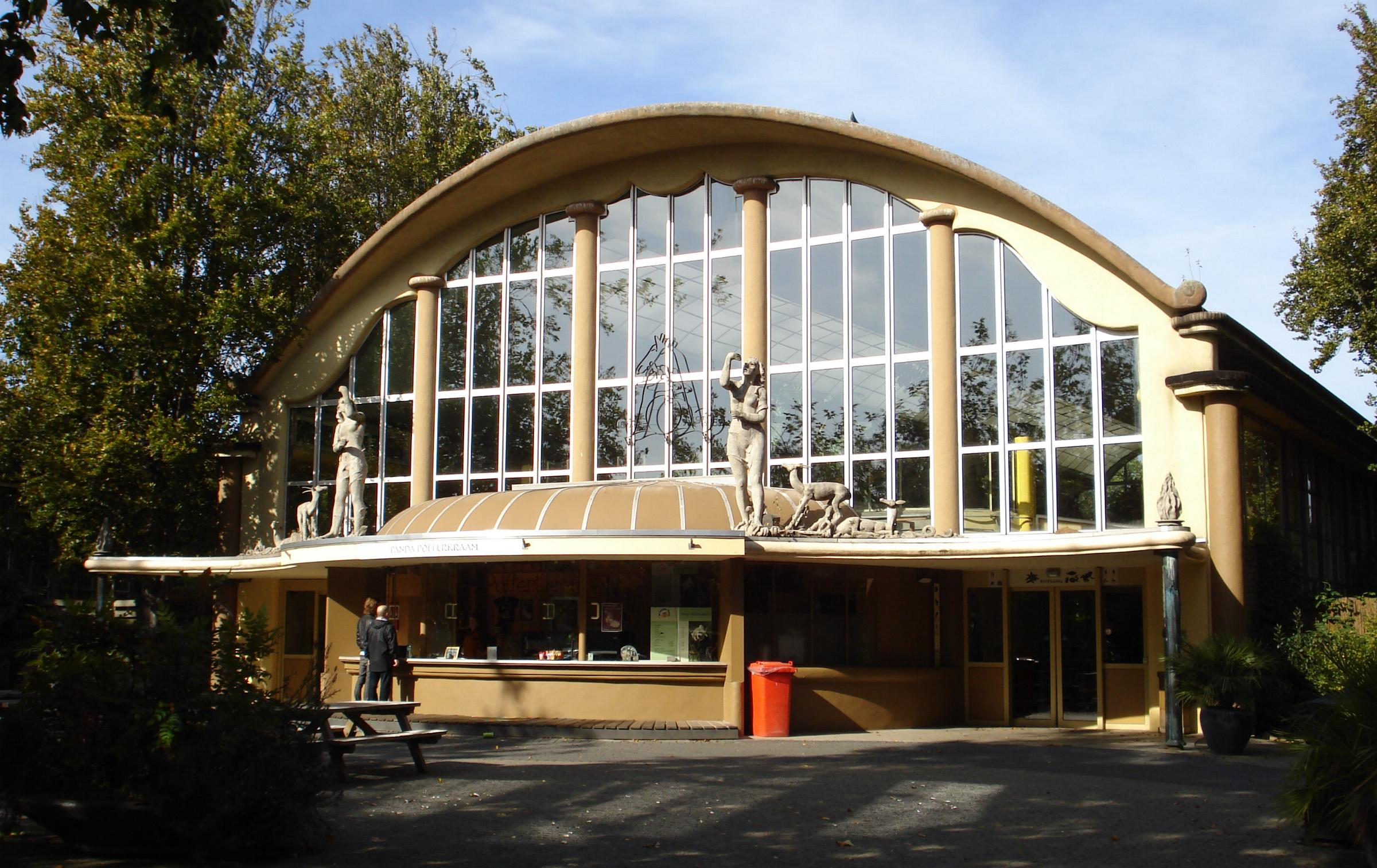 Rotterdam, diergaarde Blijdorp. Rivièrahal. Rijksmonument.